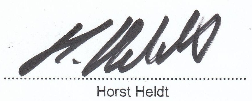 Autogramm von Horst Heldt